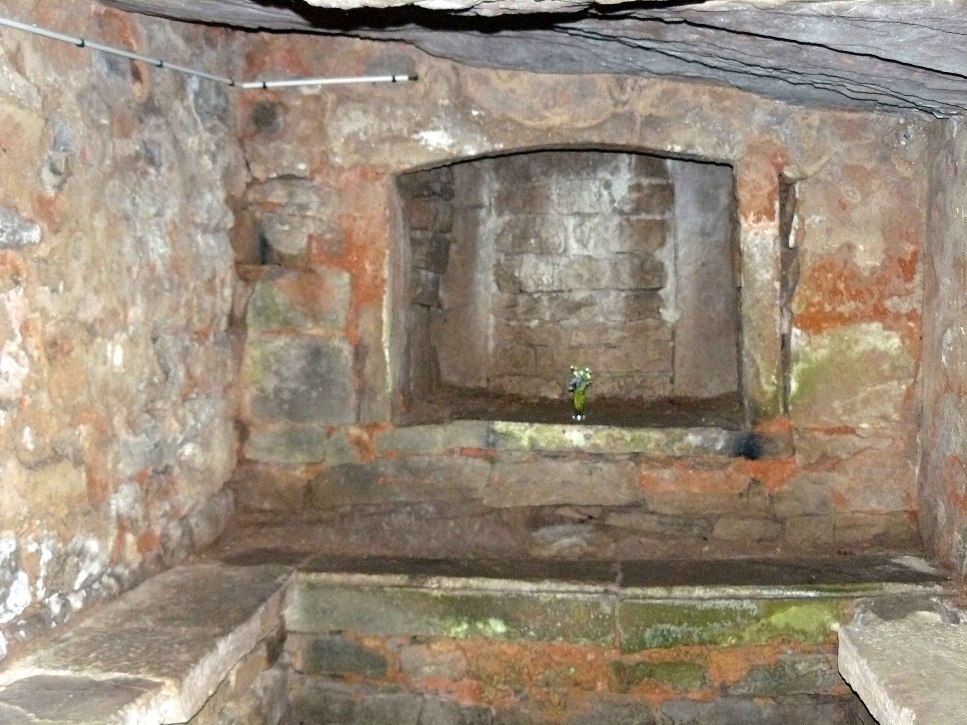 Ermitage de Saint Valbert (Saint-Valbert, Haute-Saône, France) : Intérieur de la grotte.